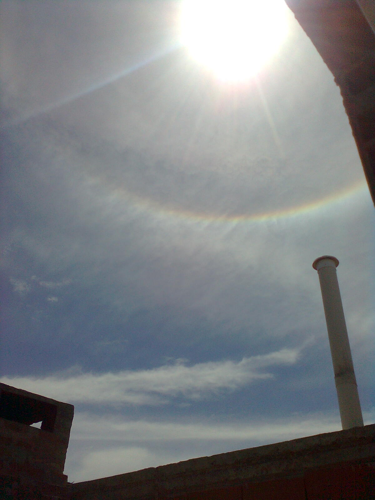 Halo en la ciudad de Punta Alta, Argentina capturada el 28 de Enero de 2013 a las 11:58hs.